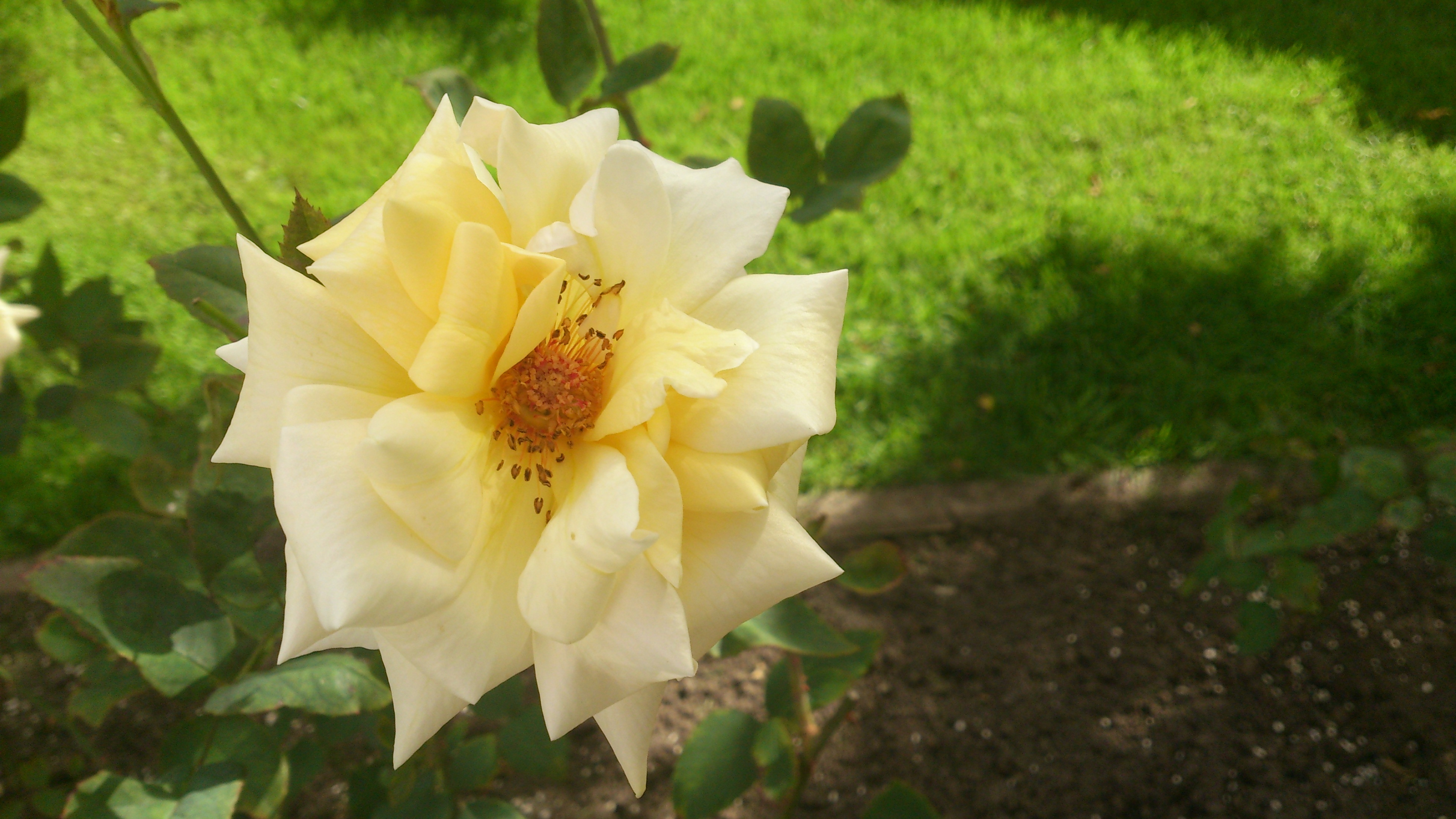 Roosisort 'Staatspräsident Päts' Tartu botaanikaaias, lähivaade, 24. august 2013.